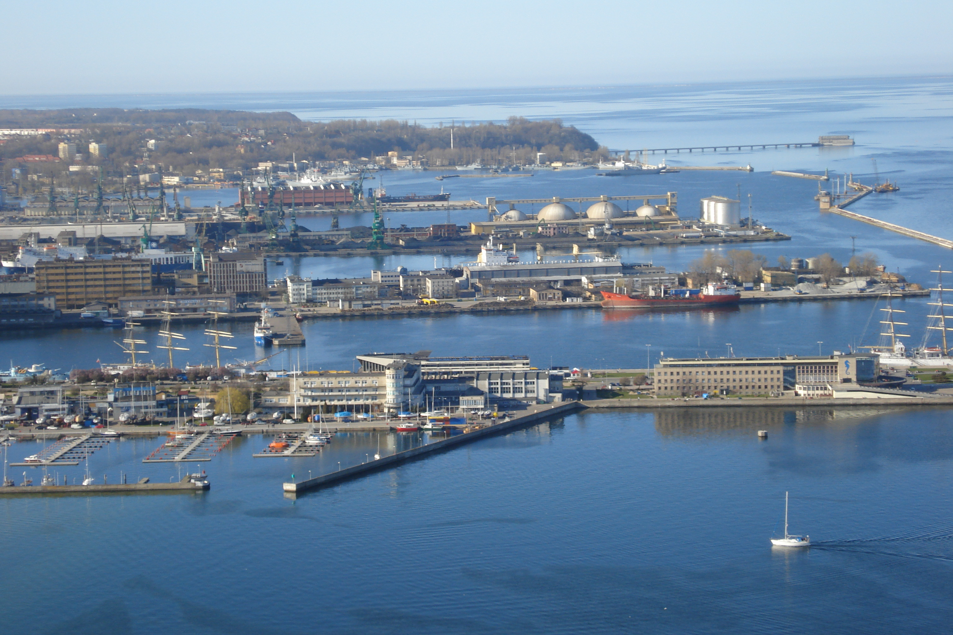 Gdynia z "lotu ptaka"